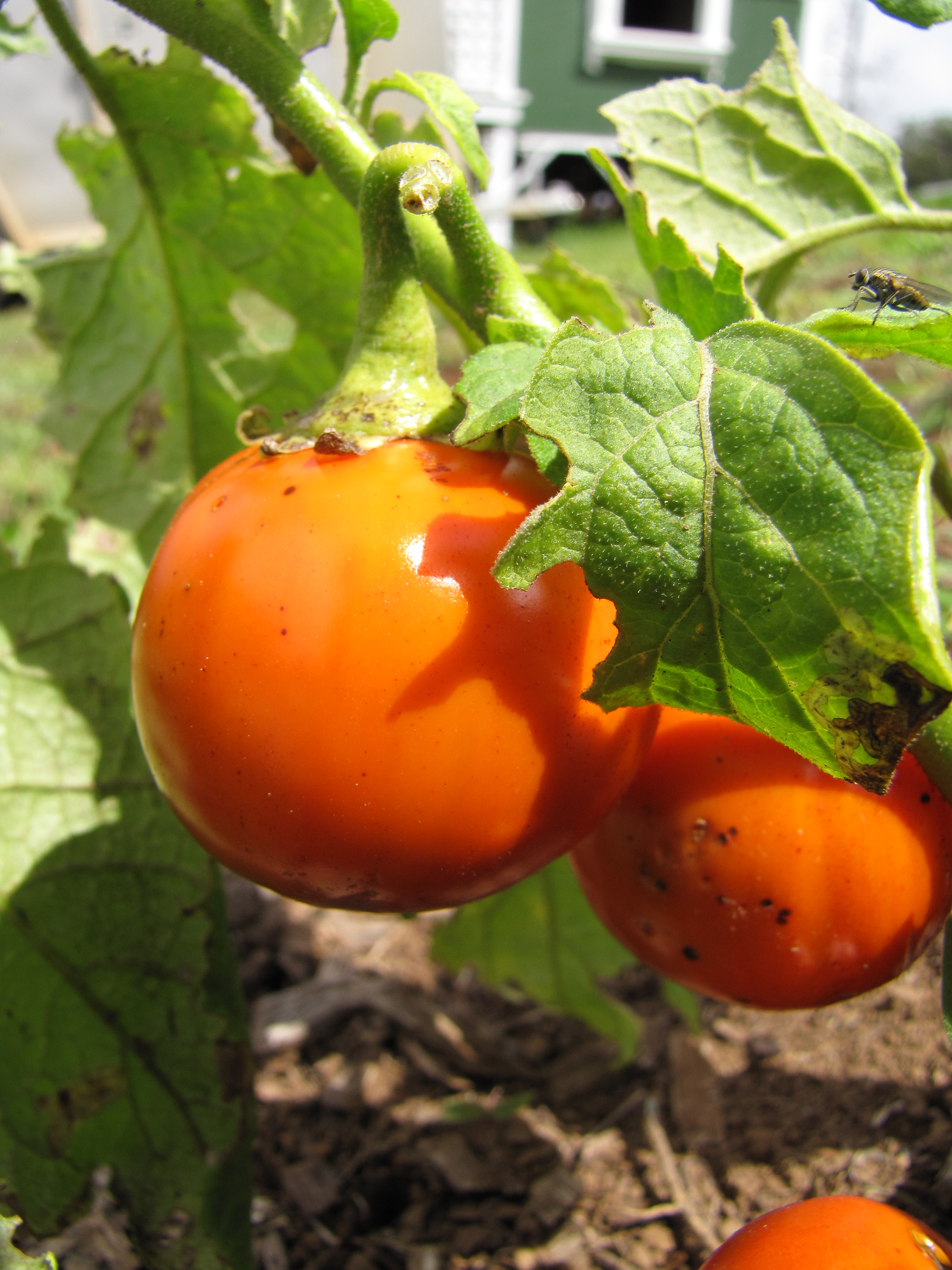 starr-100217-1981-plant-Solanum_gilo-fruit-Olinda